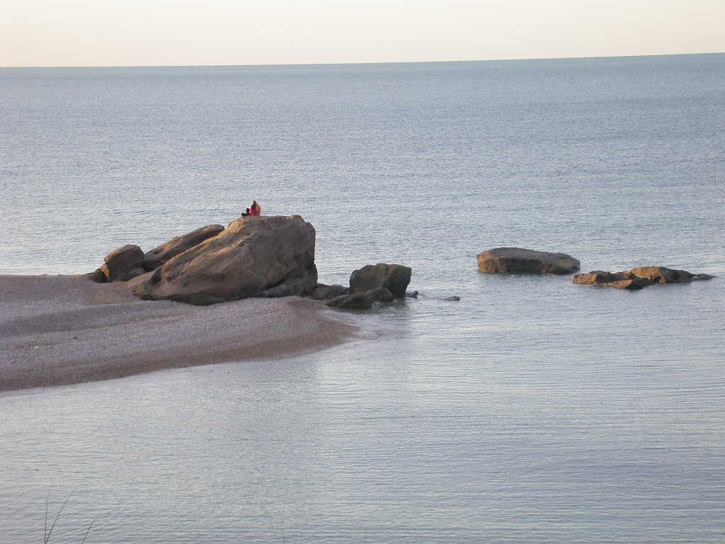 scoglione al tramonto